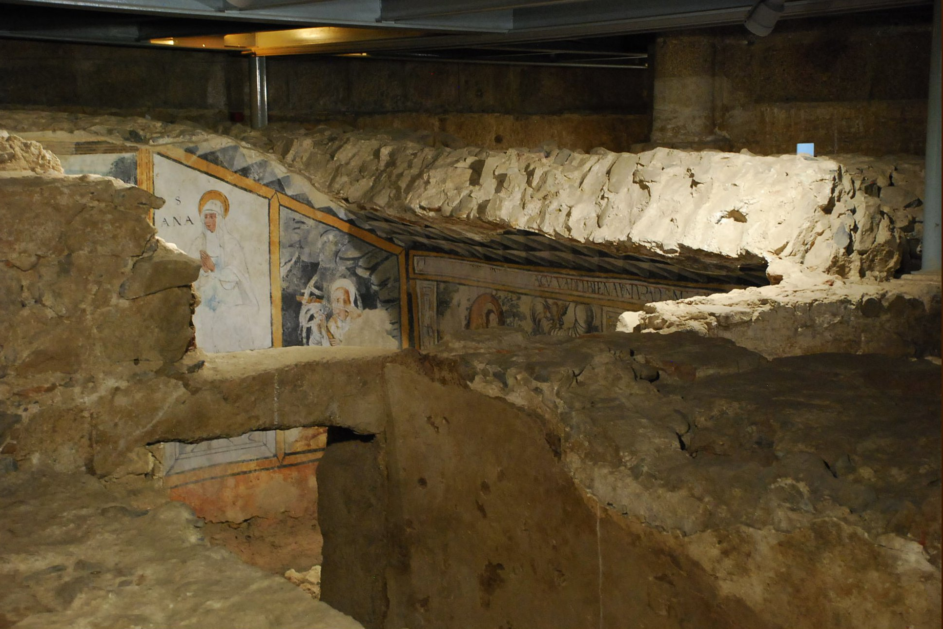 Basílica romano cristiana de Santa Eulalia en Mérida, provincia de Badajoz (España).